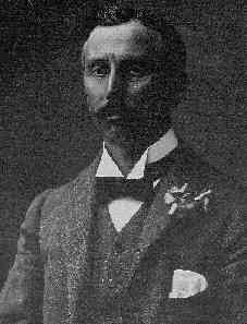 Fotografía del Arqueólogo George Edward Bonsor Saint Martin.